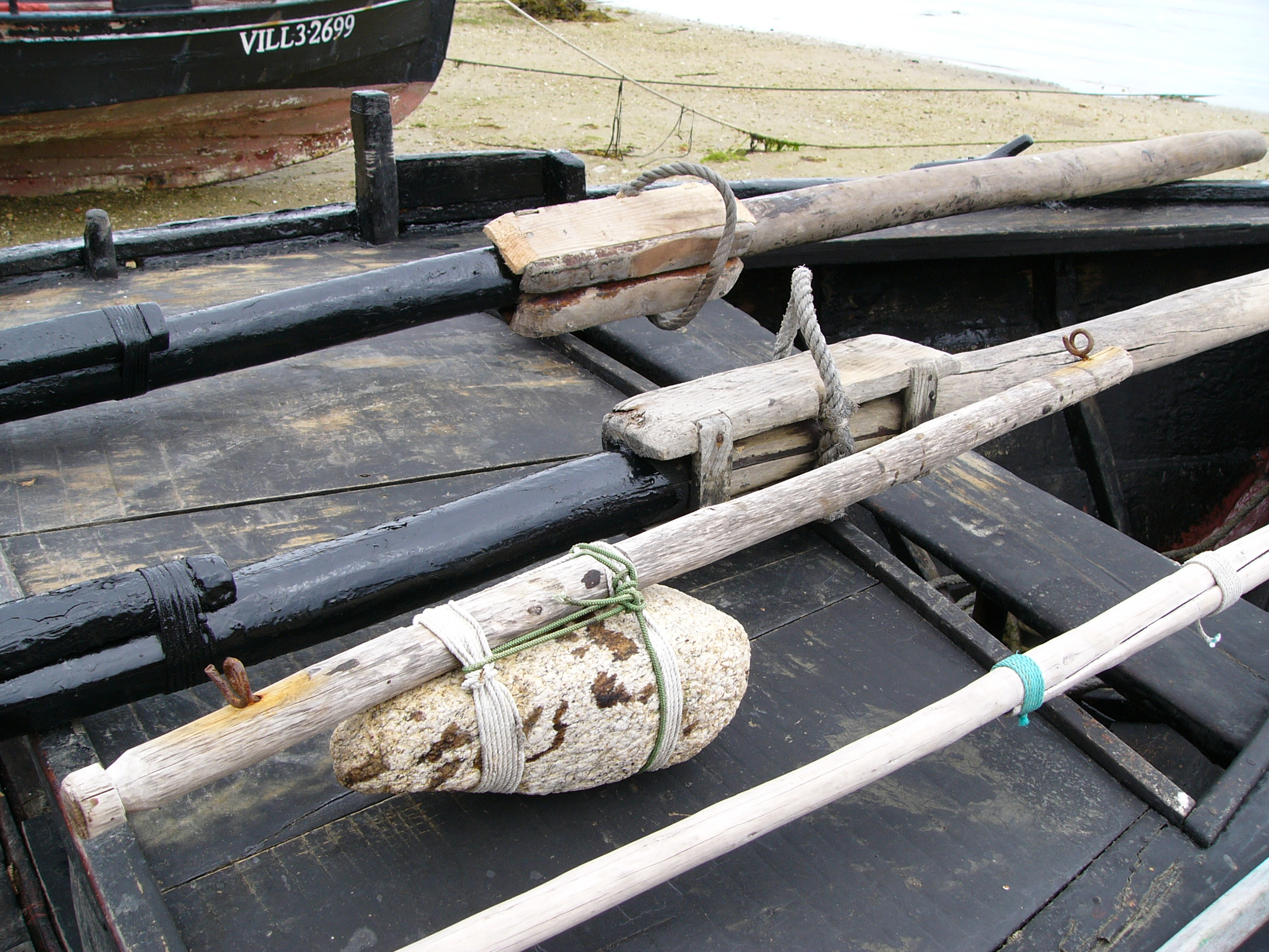 Ancre de pierre sur une embarcation de Galice, Espagne (2004)